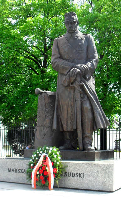 Warszawa, pomnik Józefa Piłsudskiego